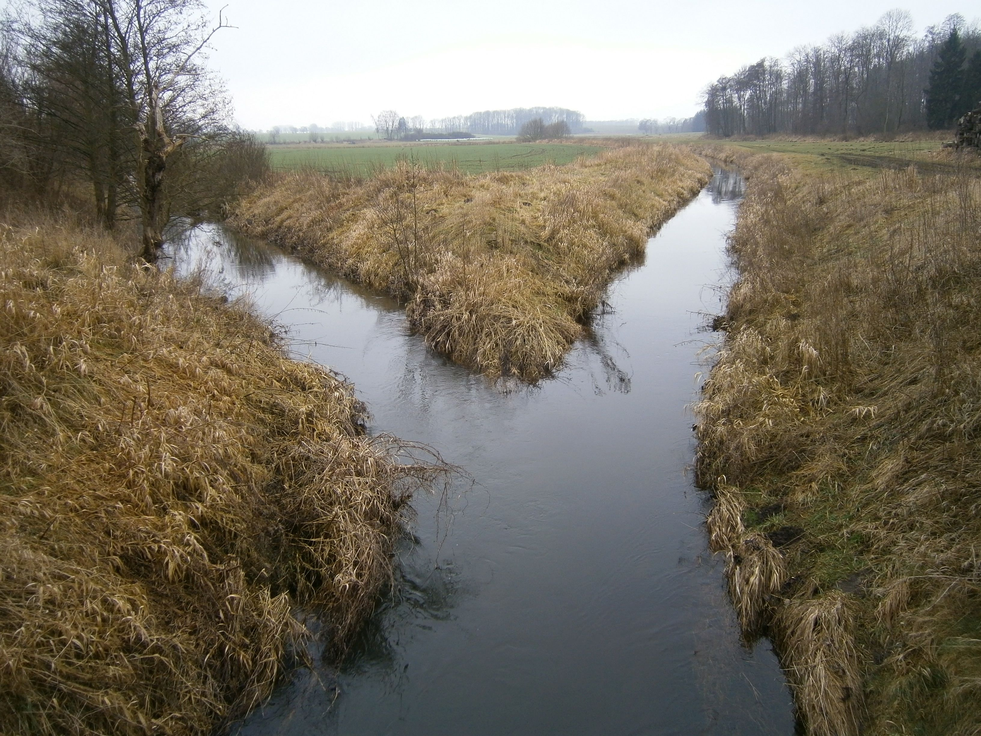 Zusammenfluss von Norder- und Süderbeste